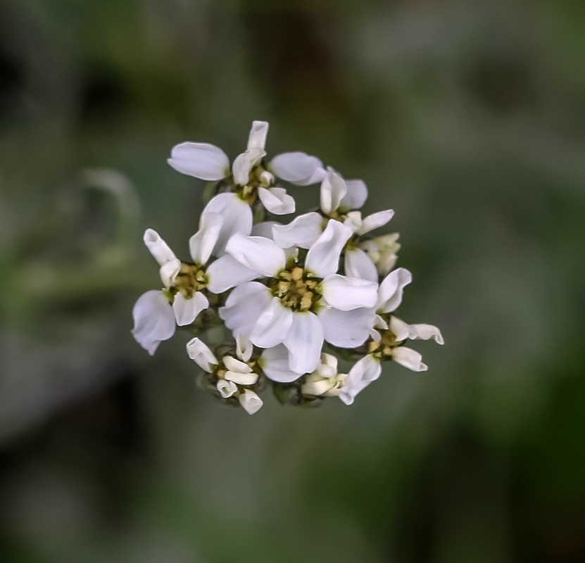 Alpengarten Villacher Alpe: Milchweißer_Mannsschild